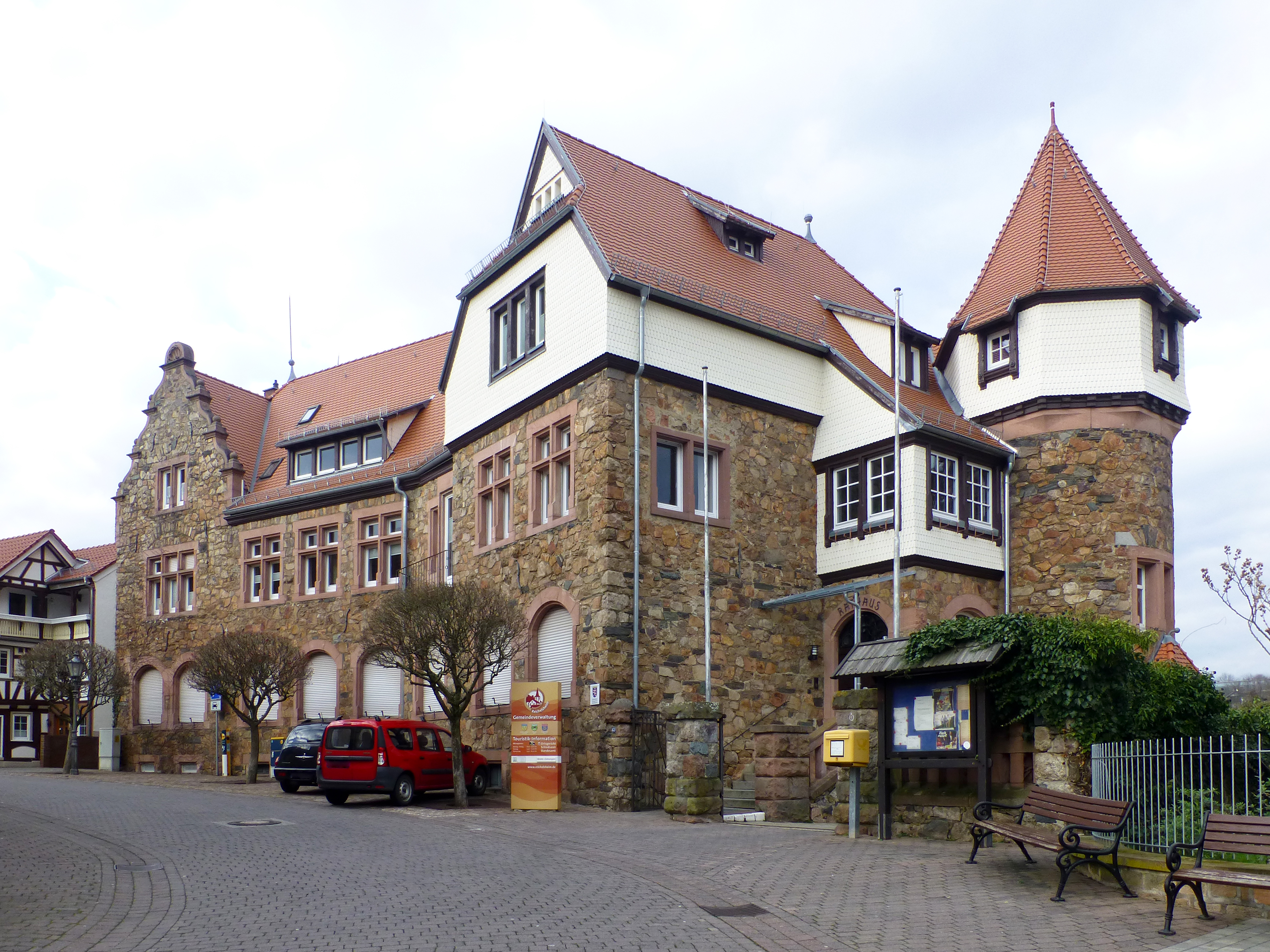 Das heutige Rathaus von Reichelsheim wurde 1902 als Amtsgericht errichtet